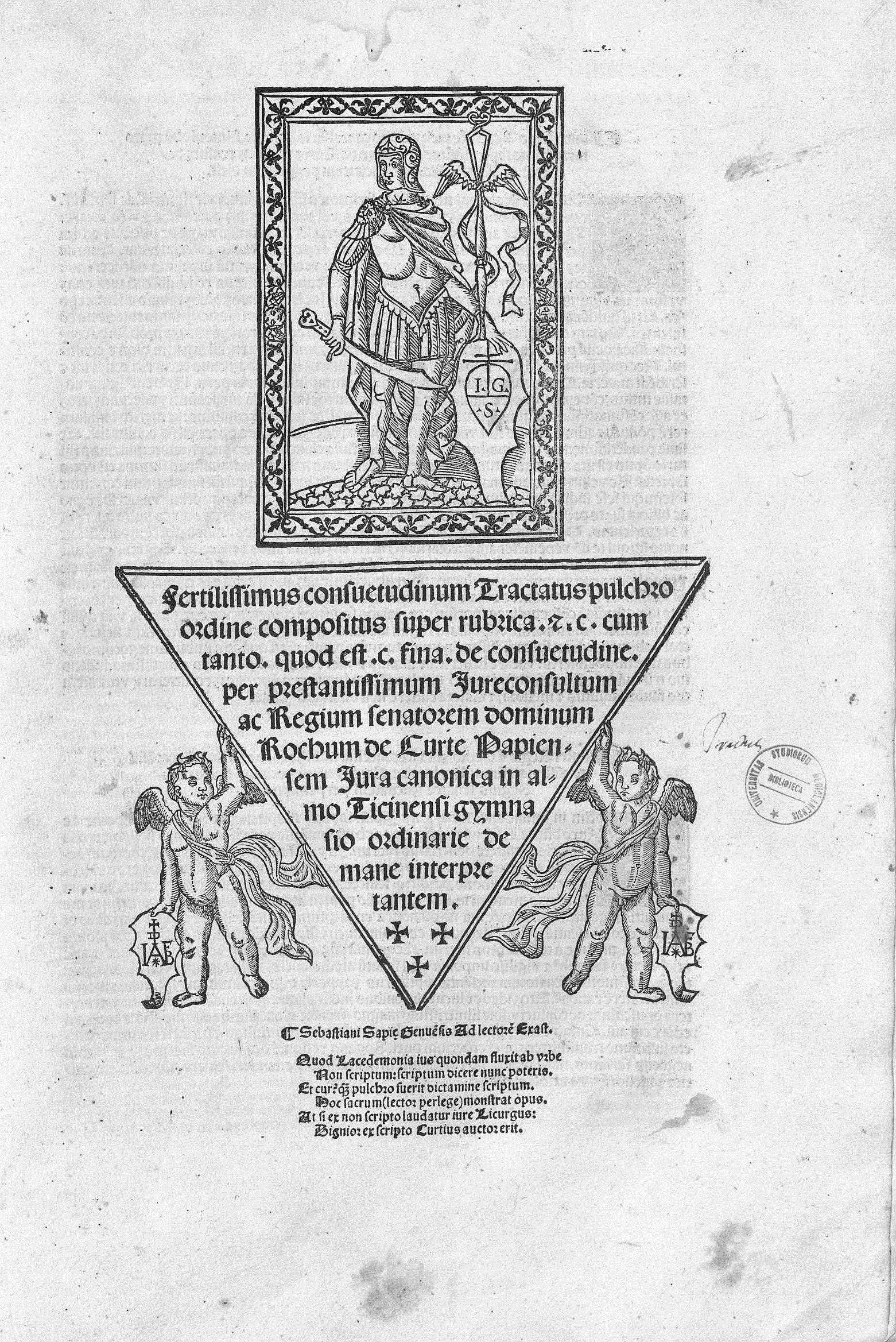 Frontespizio